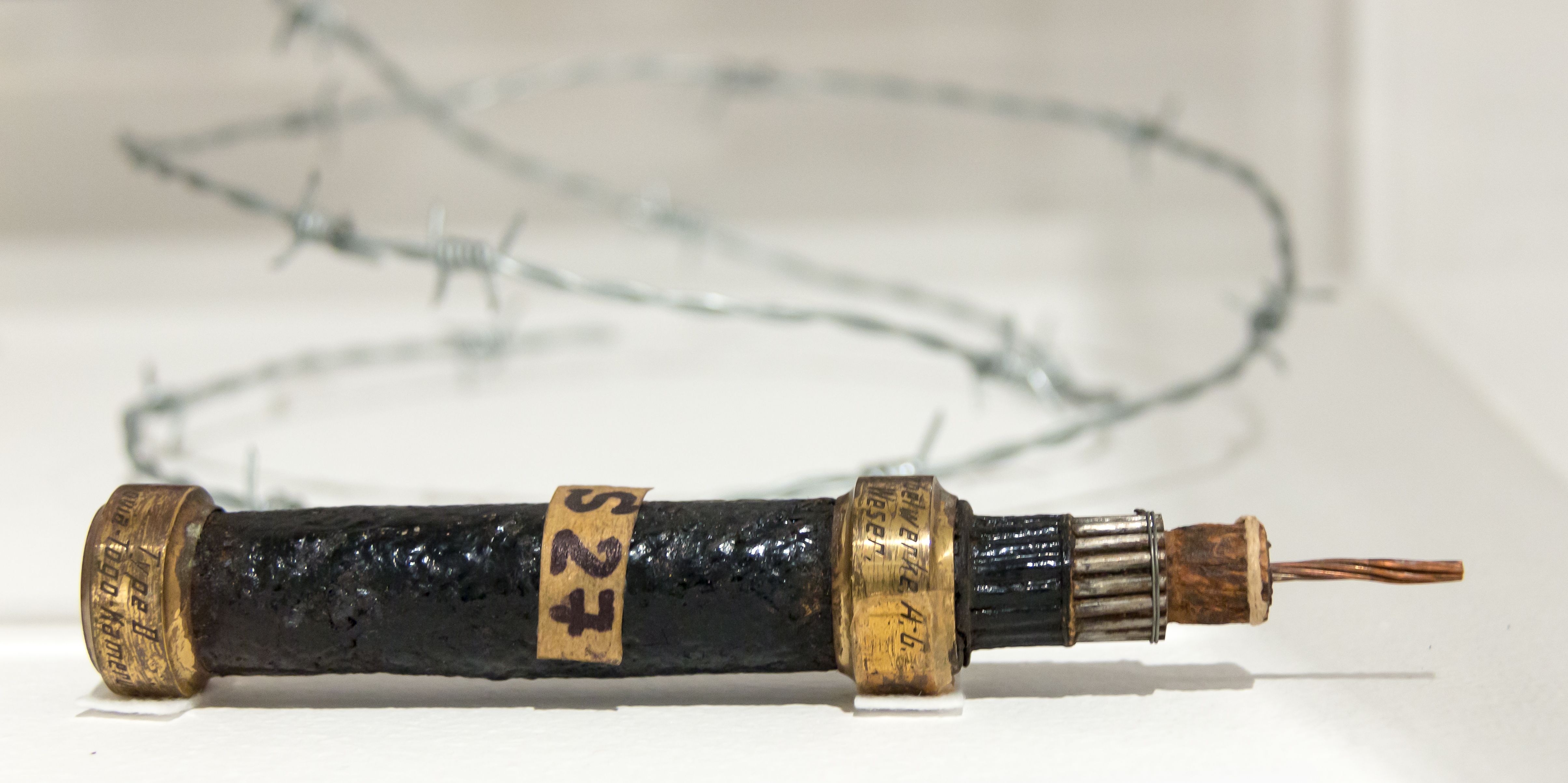 Ausstellung im Kölnischen Stadtmuseum: „Köln 1914 – Metropole im Westen“. Thema: Seekabel und Stacheldraht. Objekt: Muster des Seekabels zwischen Monrovia, Togo und Kamerun. Hersteller: Norddeutsche Seekabelwerke (gegr. von Felten & Guilleaume)